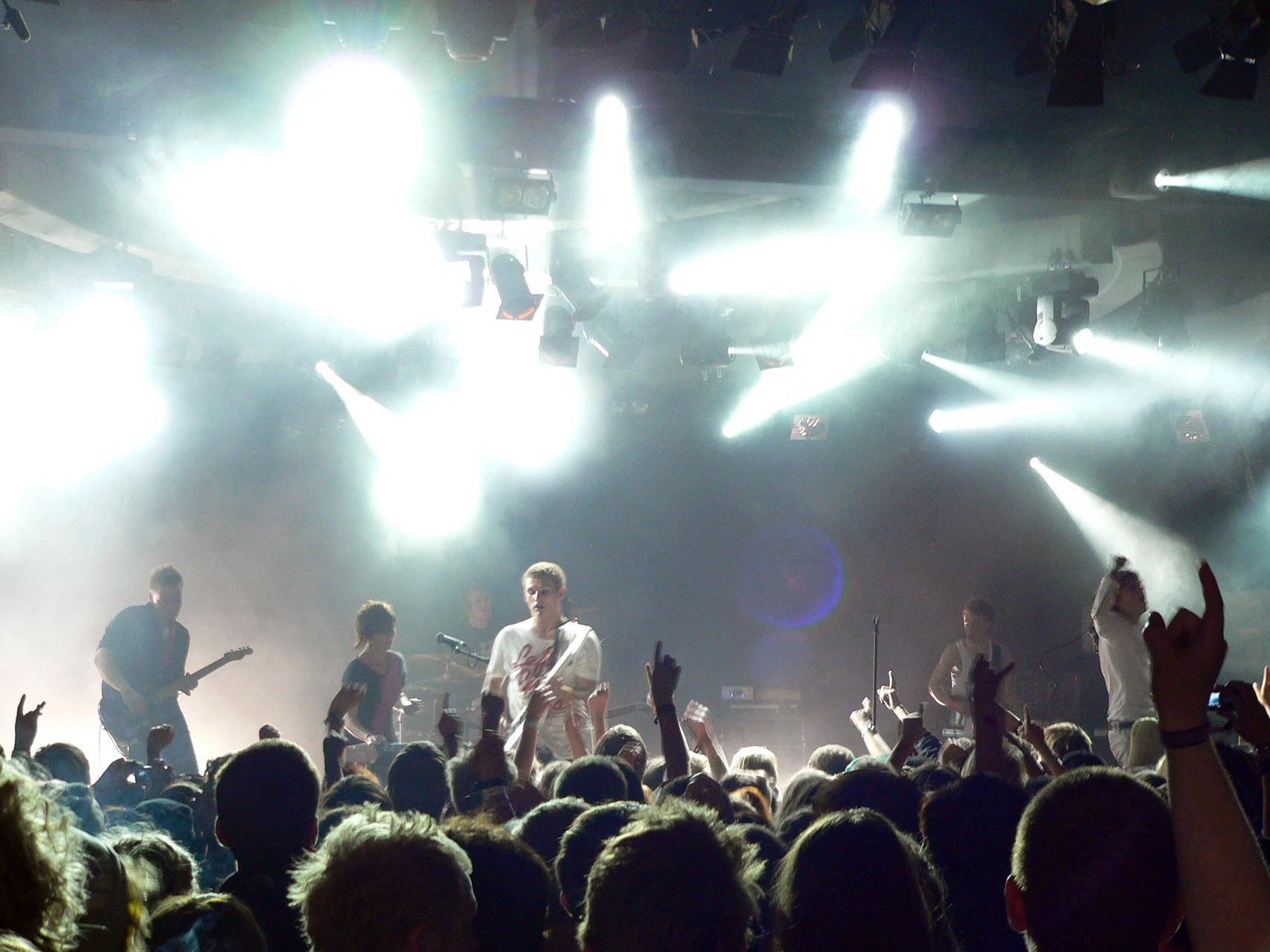 Dúné at Roskilde Festival 2007